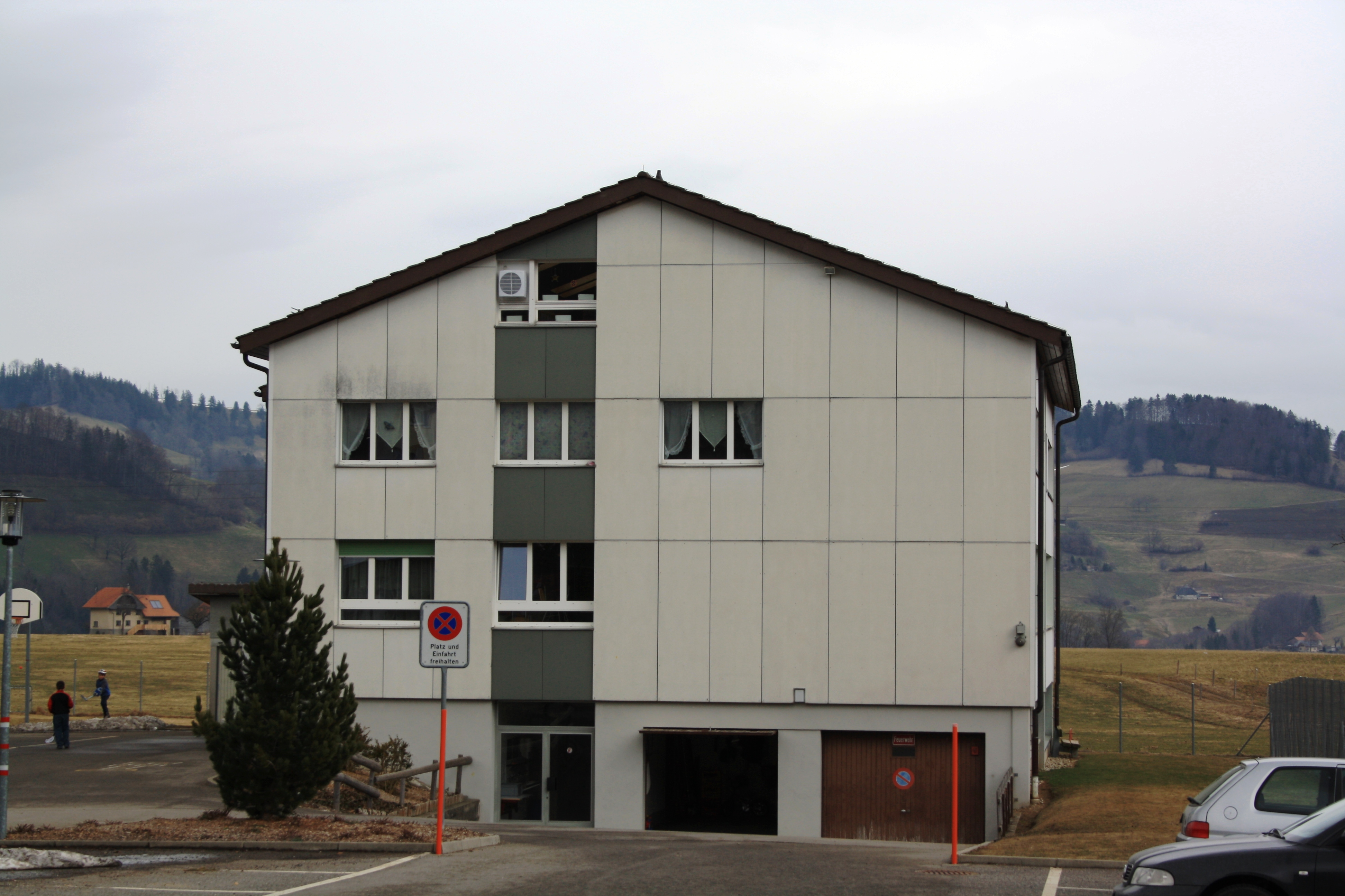 Gemeindehaus Brünisried, Kanton Freiburg, Schweiz